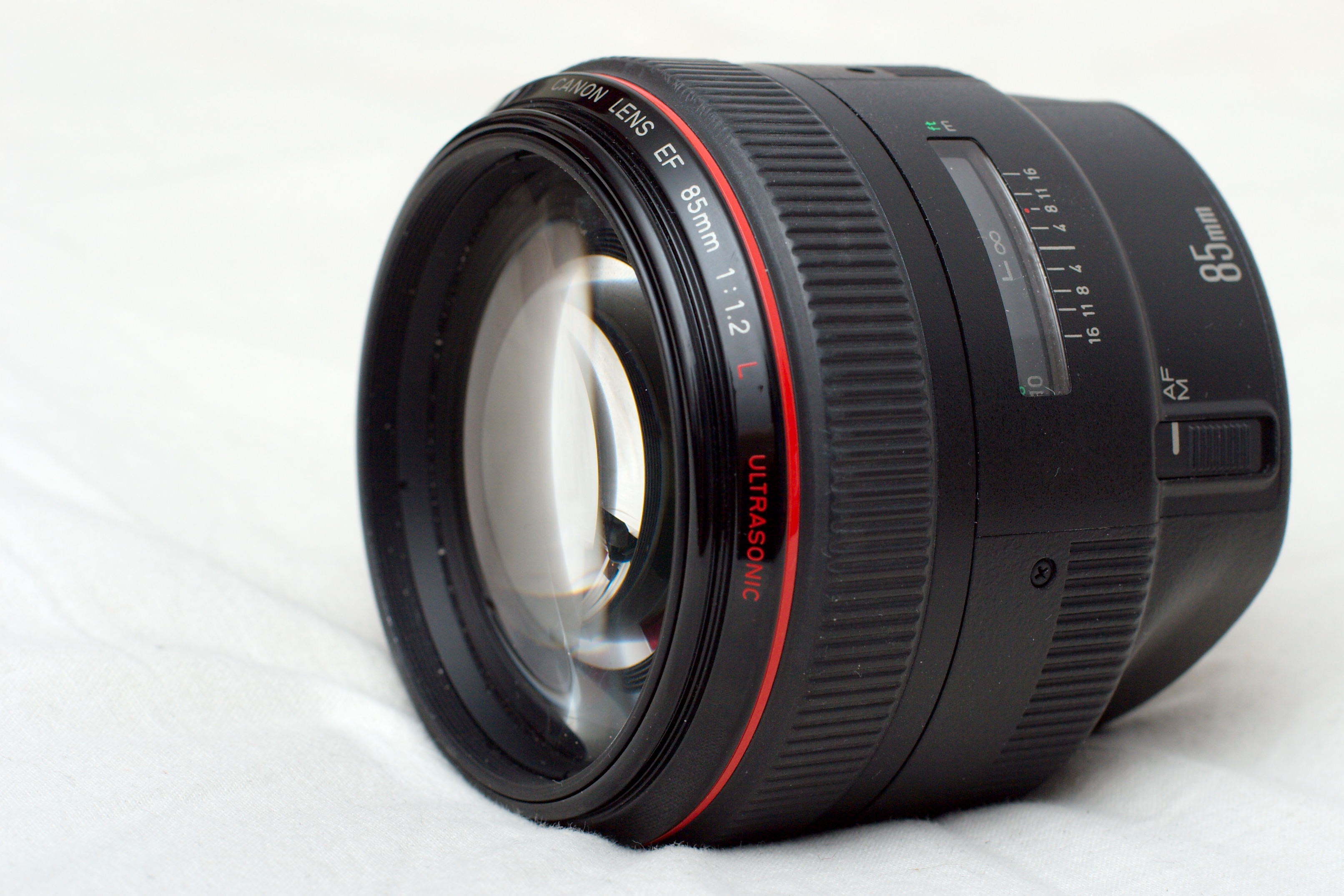 Canon EF 85mm f/1.2L lens